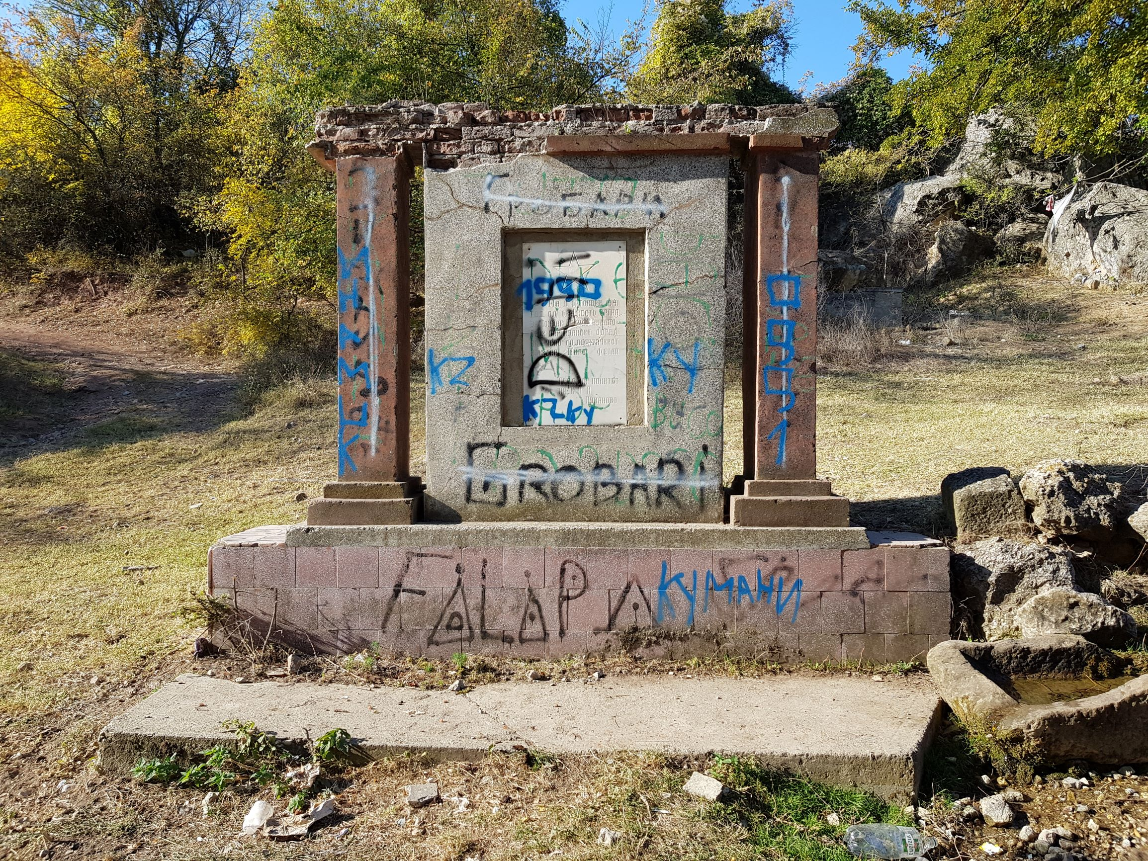 Споменик во Студена вода, Кумановско, на местото на формирање на Козјачкиот партизански одред во 1941 година